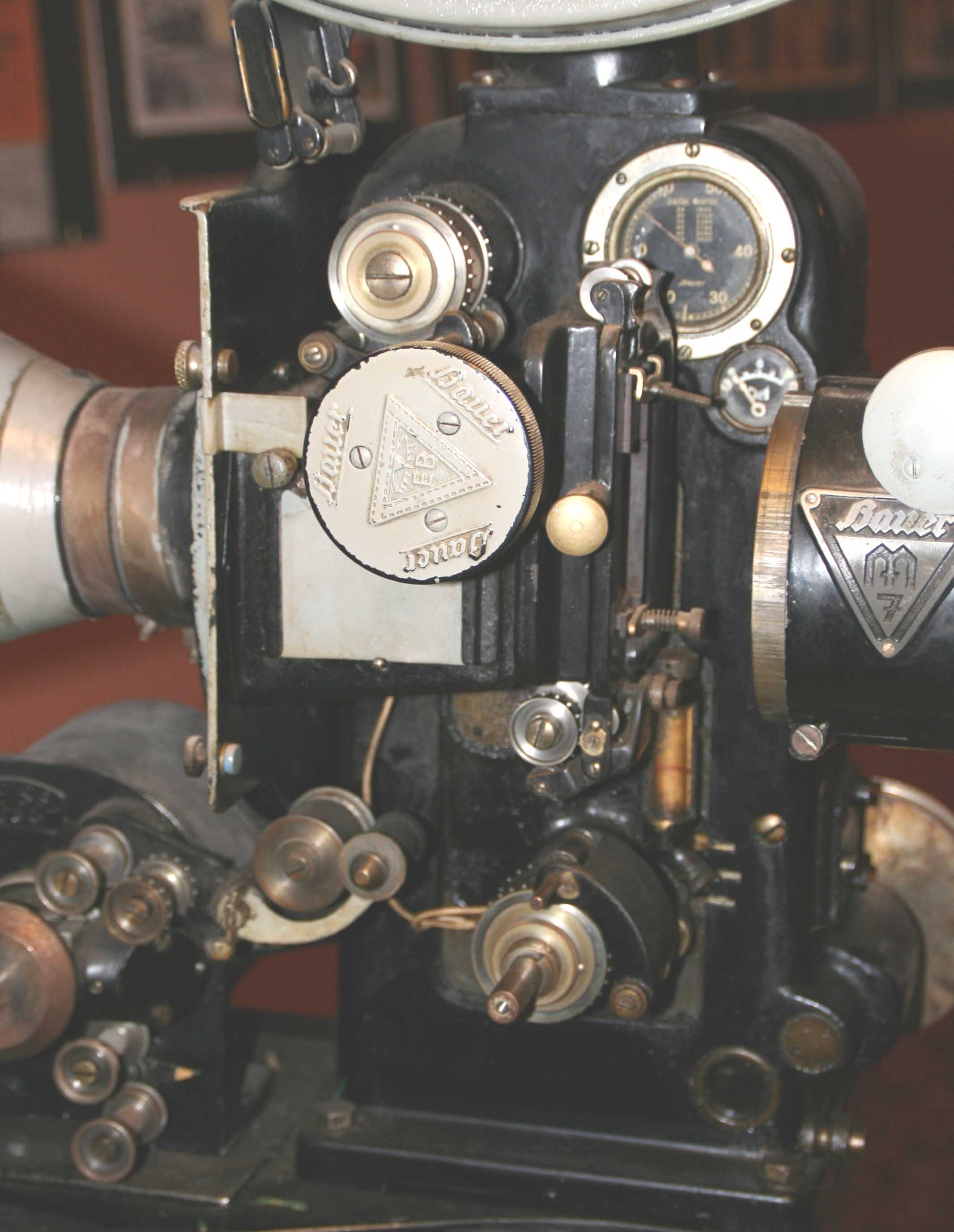 Kursaal Bauer-Projekter.